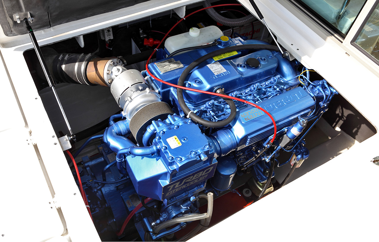 Isuzu type UM4BG1TCG diesel marine engine (4BG1).